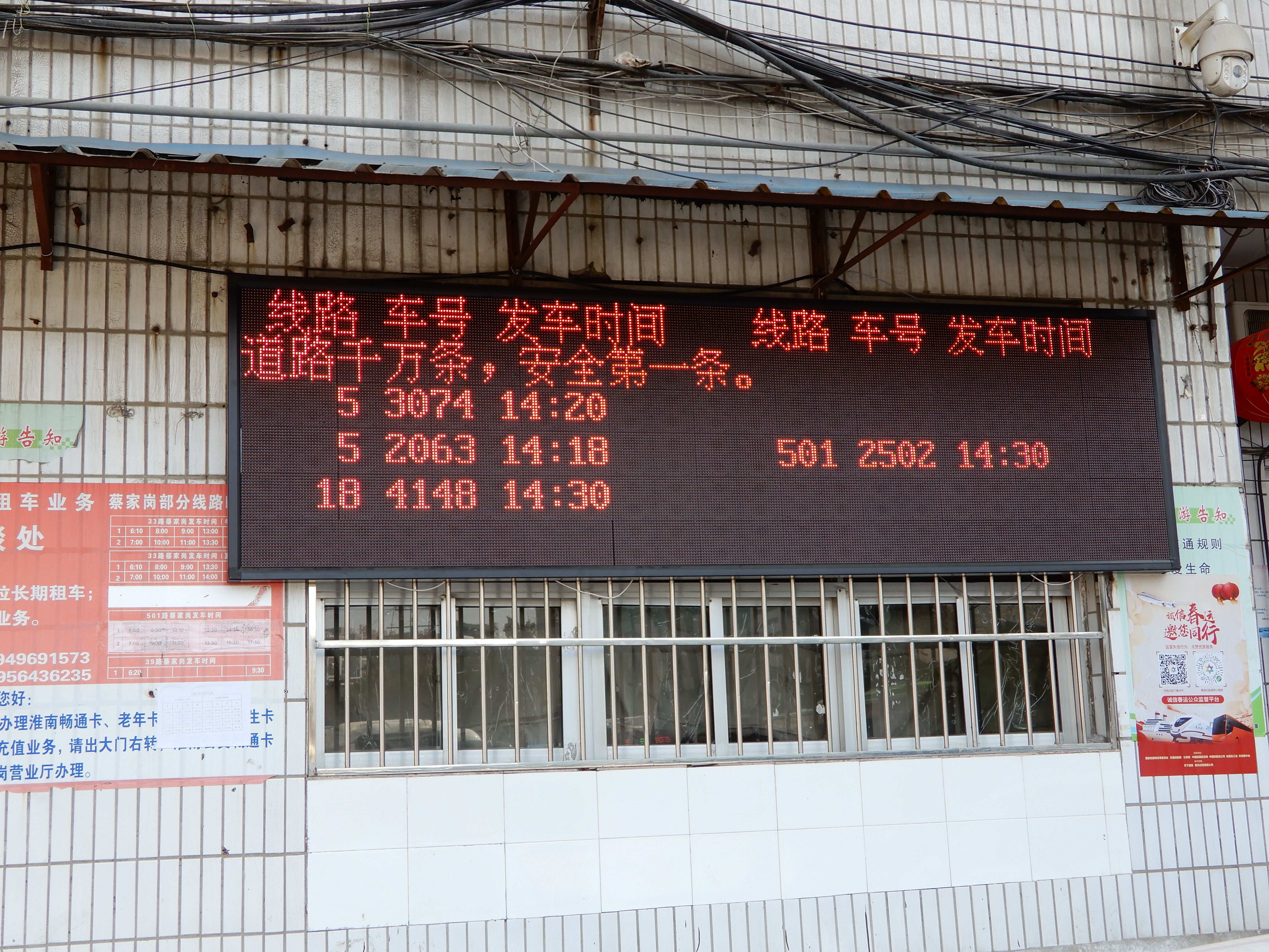 中文（中国大陆）: “道路千万条，安全第一条”标语，摄于淮南蔡家岗公交枢纽